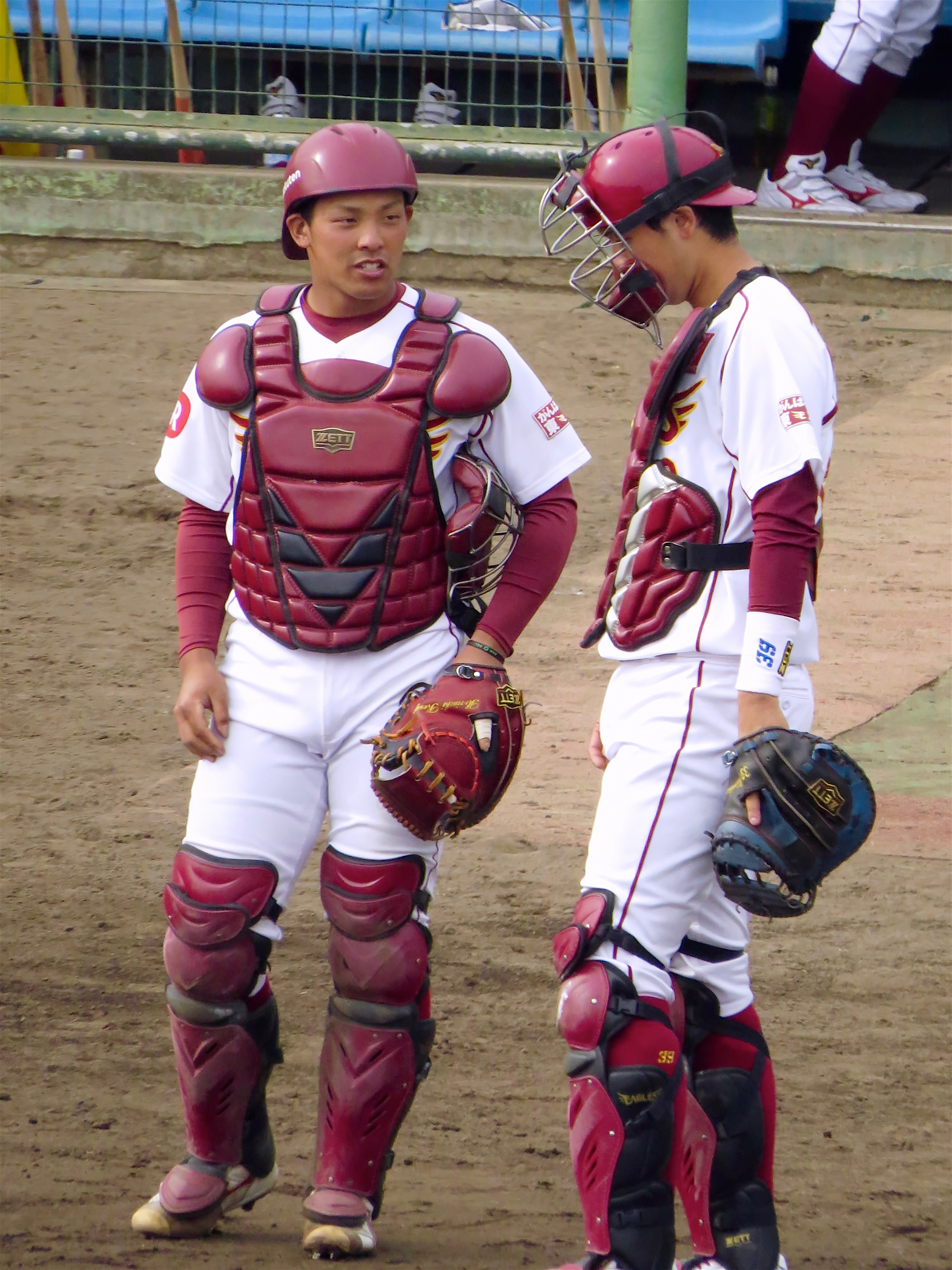 さいたま市営浦和球場にて